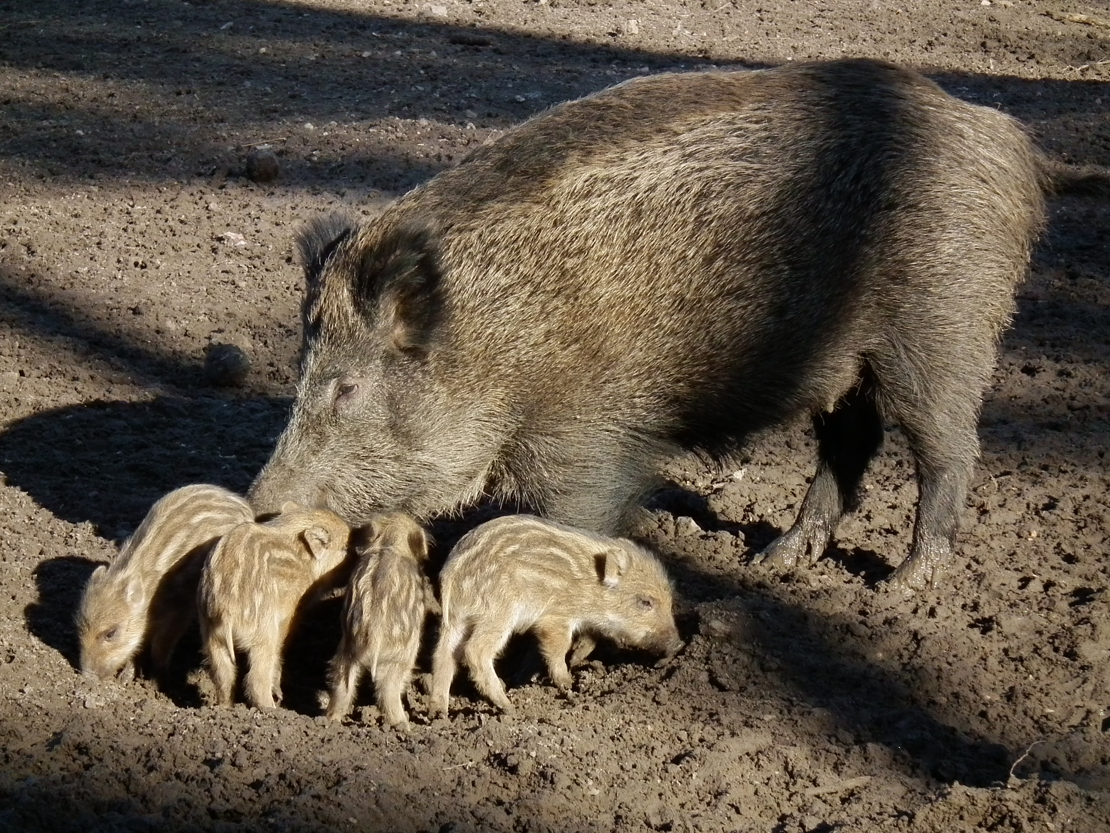 Bache mit vier Frischlingen (Sus scrofa) im Alter von circa zwei Wochen, fotografiert im Wildgehege Rheinauer Wald (Mannheim, Baden-Württemberg, Deutschland)